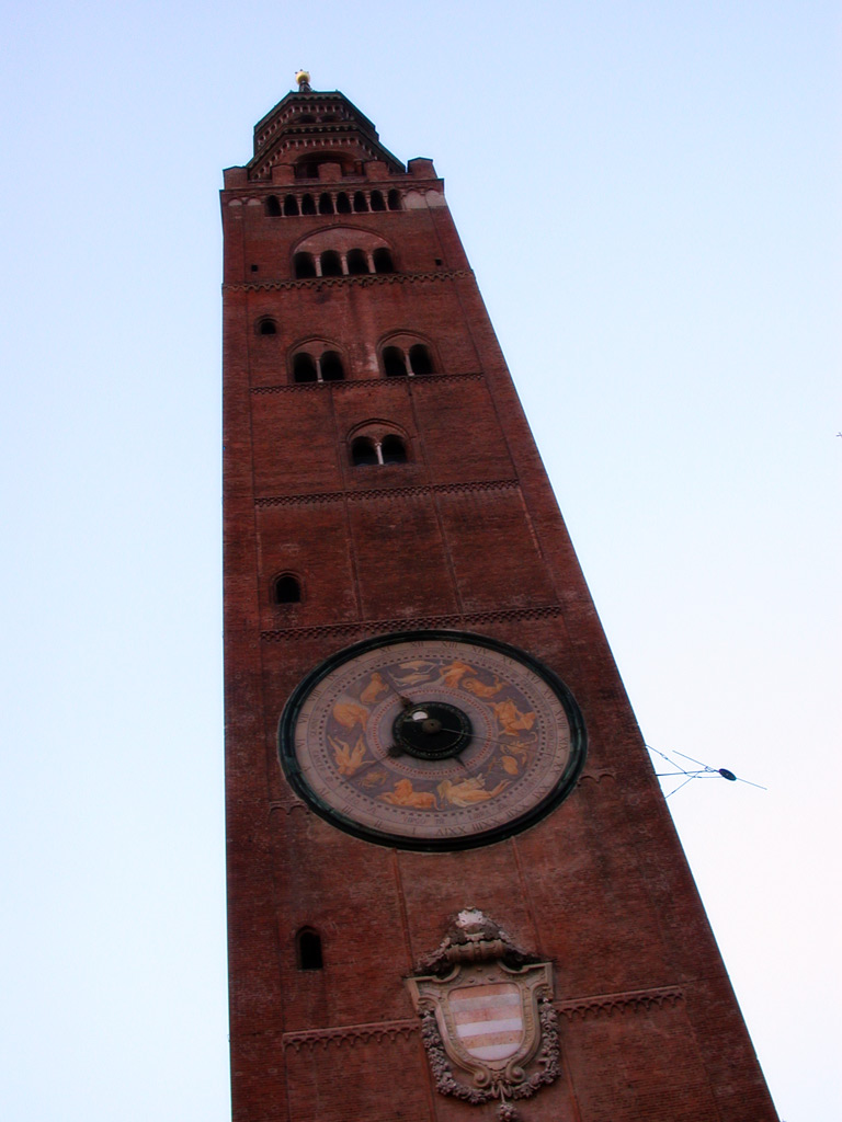 Il Torrazzo, progettato da Francesco Pecorari, a Cremona, Lombardia, Italia